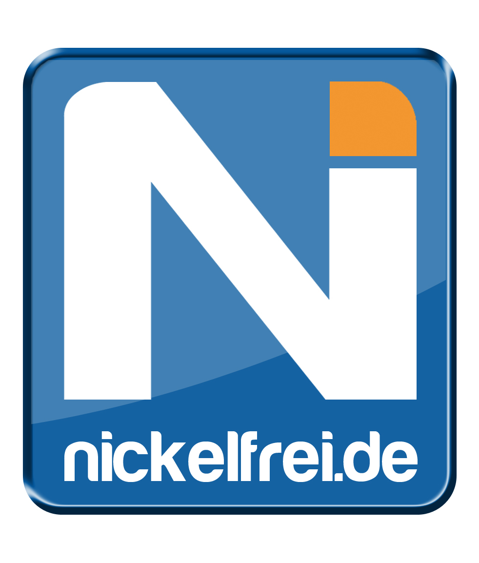 Das aktuelle Logo von Nickelfrei.de - Das Gesundheitsportal für Nickelallergiker. "Ni" ist das chemische Elementsymbol für Nickel (Ordnungszahl: 28).